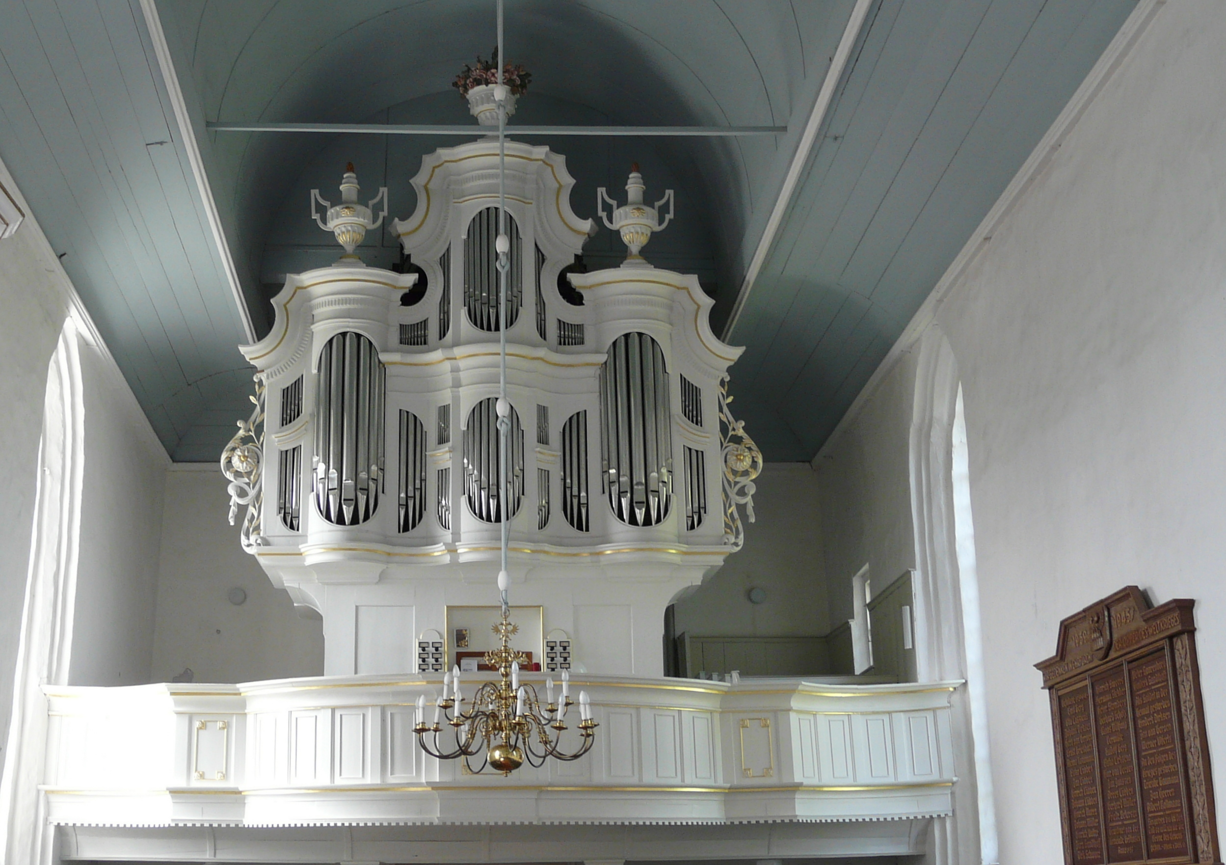 Orgel in Groothusen, Ostfriesland, Deutschland